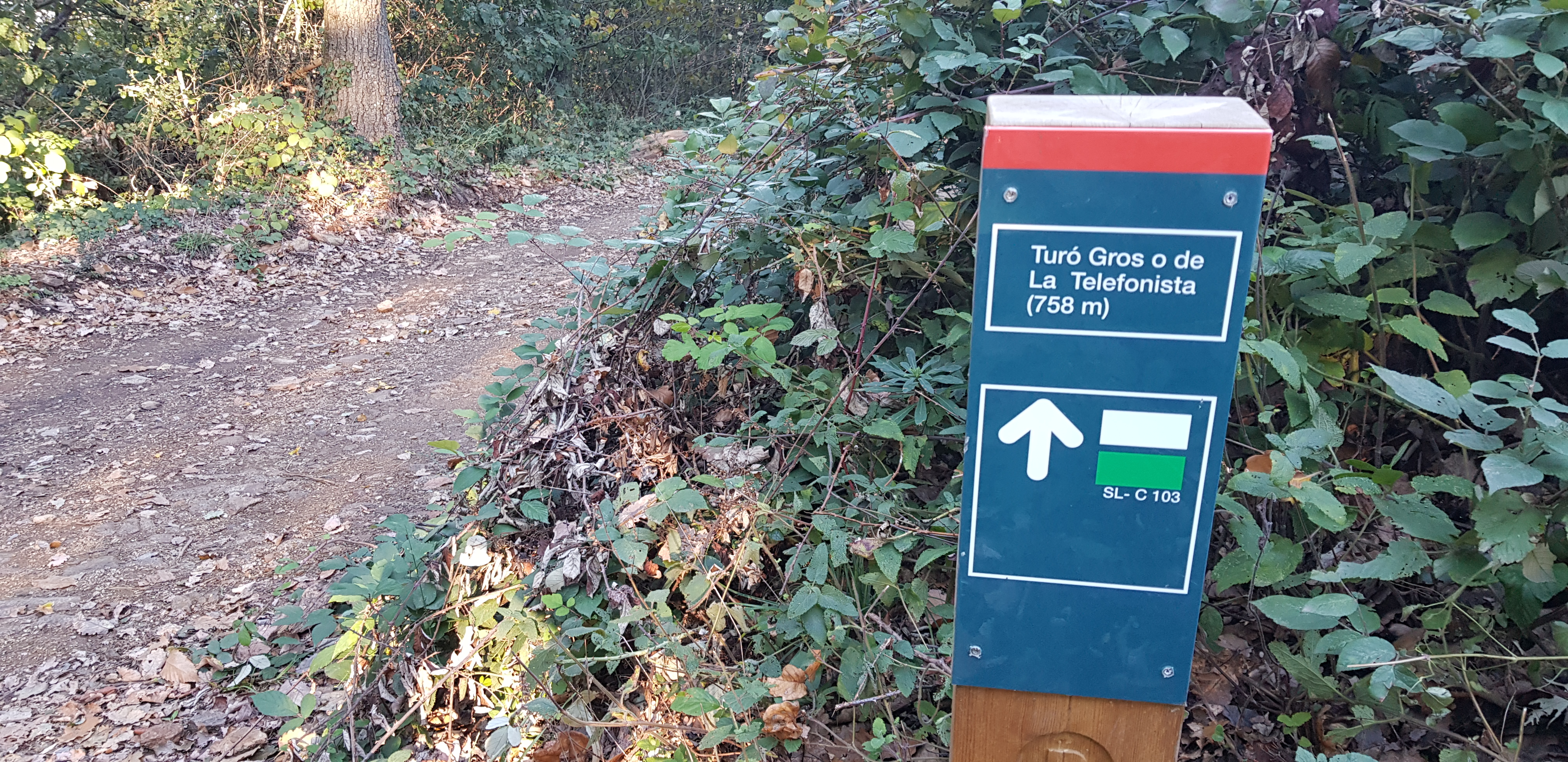 Pal indicador Turó Gros o de la Telefonista.